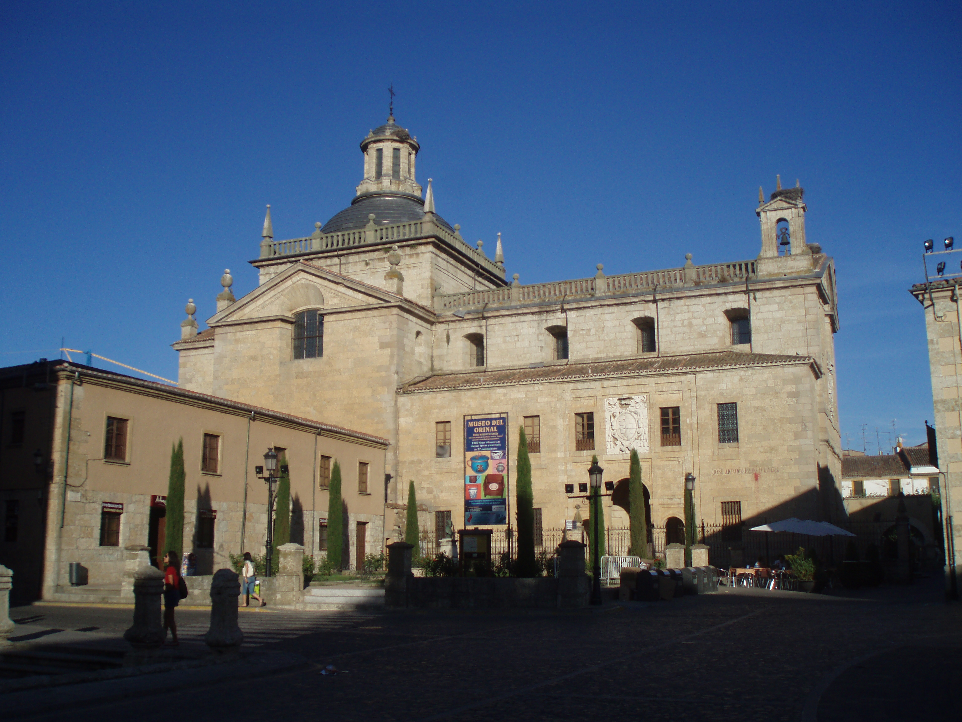 Fachada principal de la Capilla de Cerralbo de Ciudad Rodrigo.